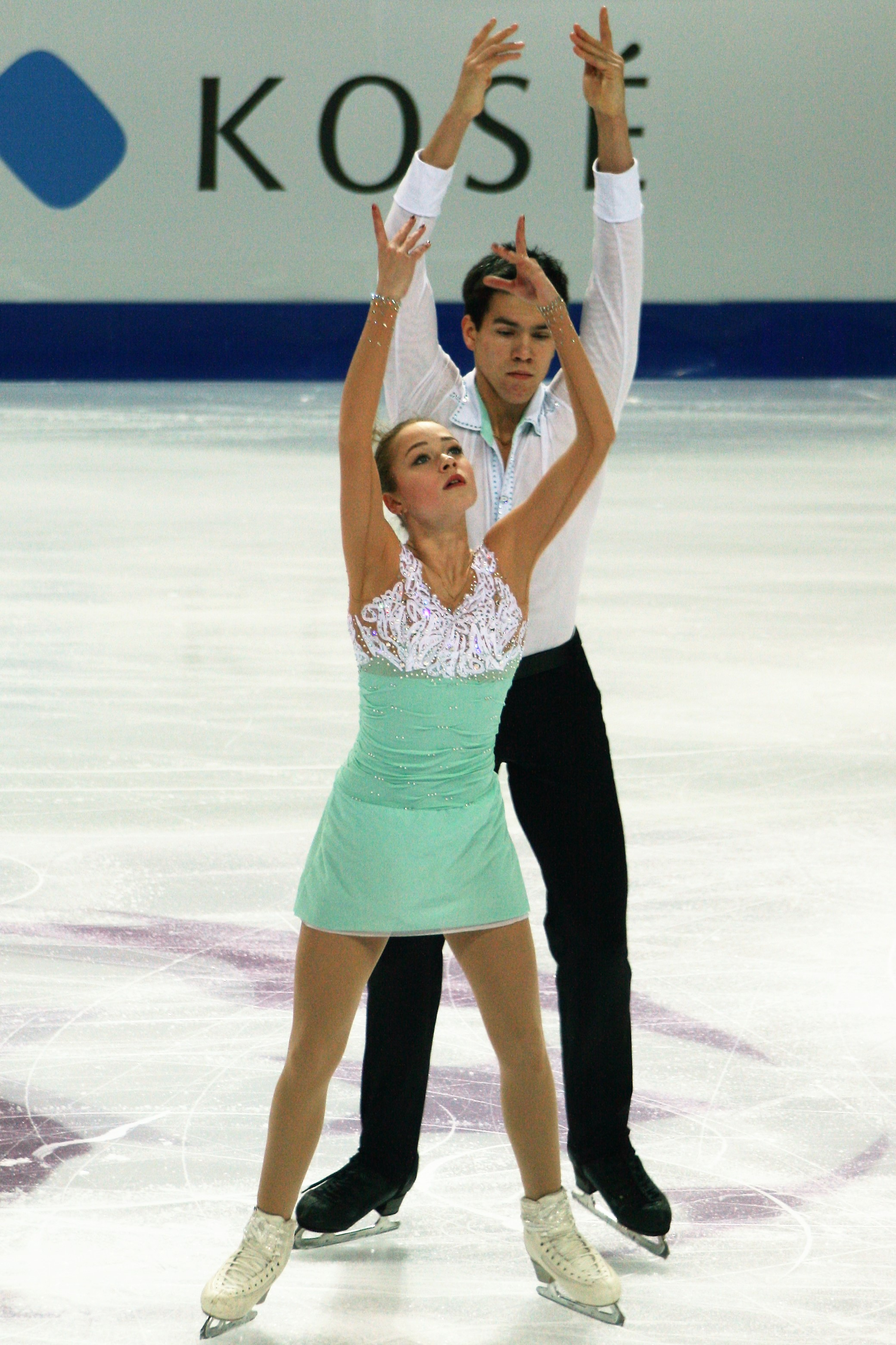 Алина Устимкина / Никита Володин (Россия) на финале Гран-при по фигурному катанию среди юниоров 2016-2017